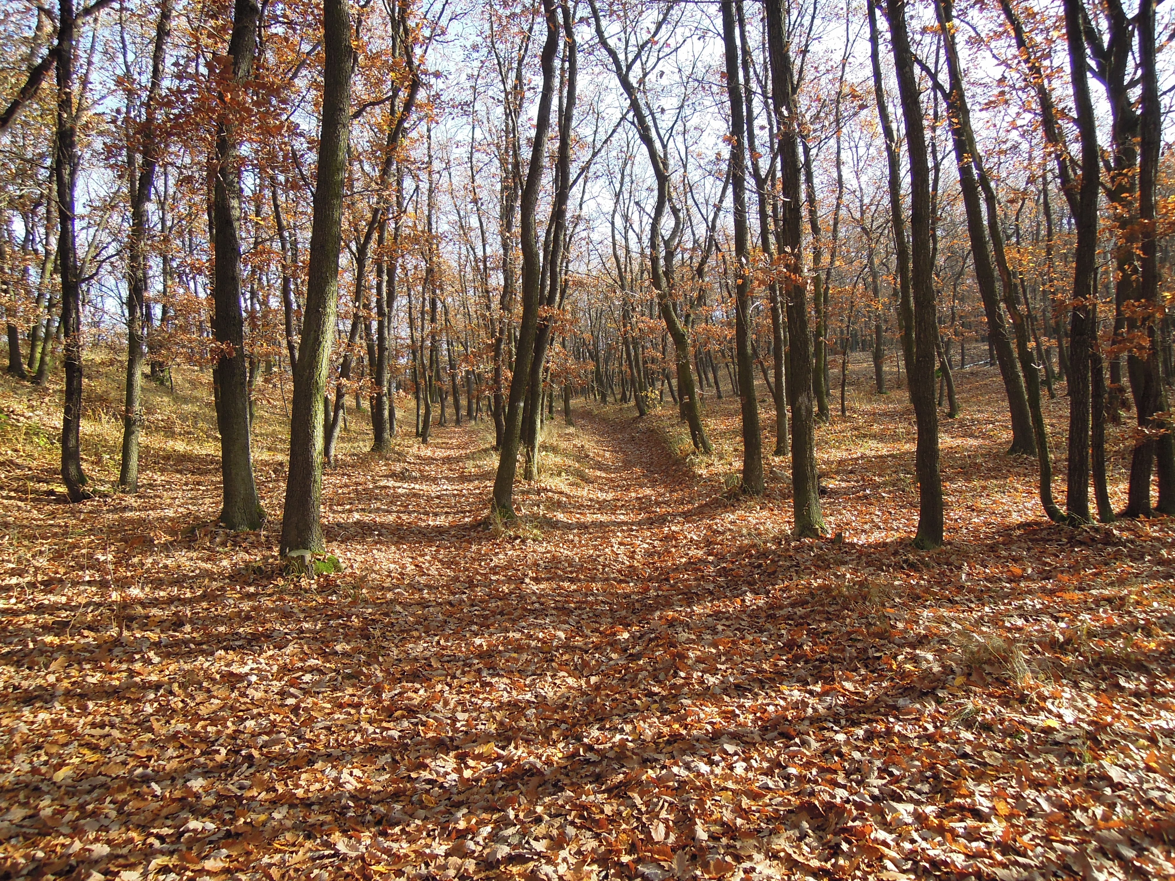 cesty, přírodní rezervace Šance